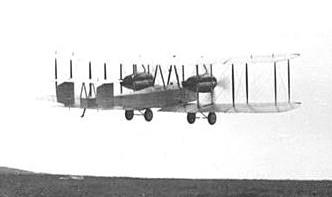 Recorte de File:Alcockandbrown takeoff1919.jpg